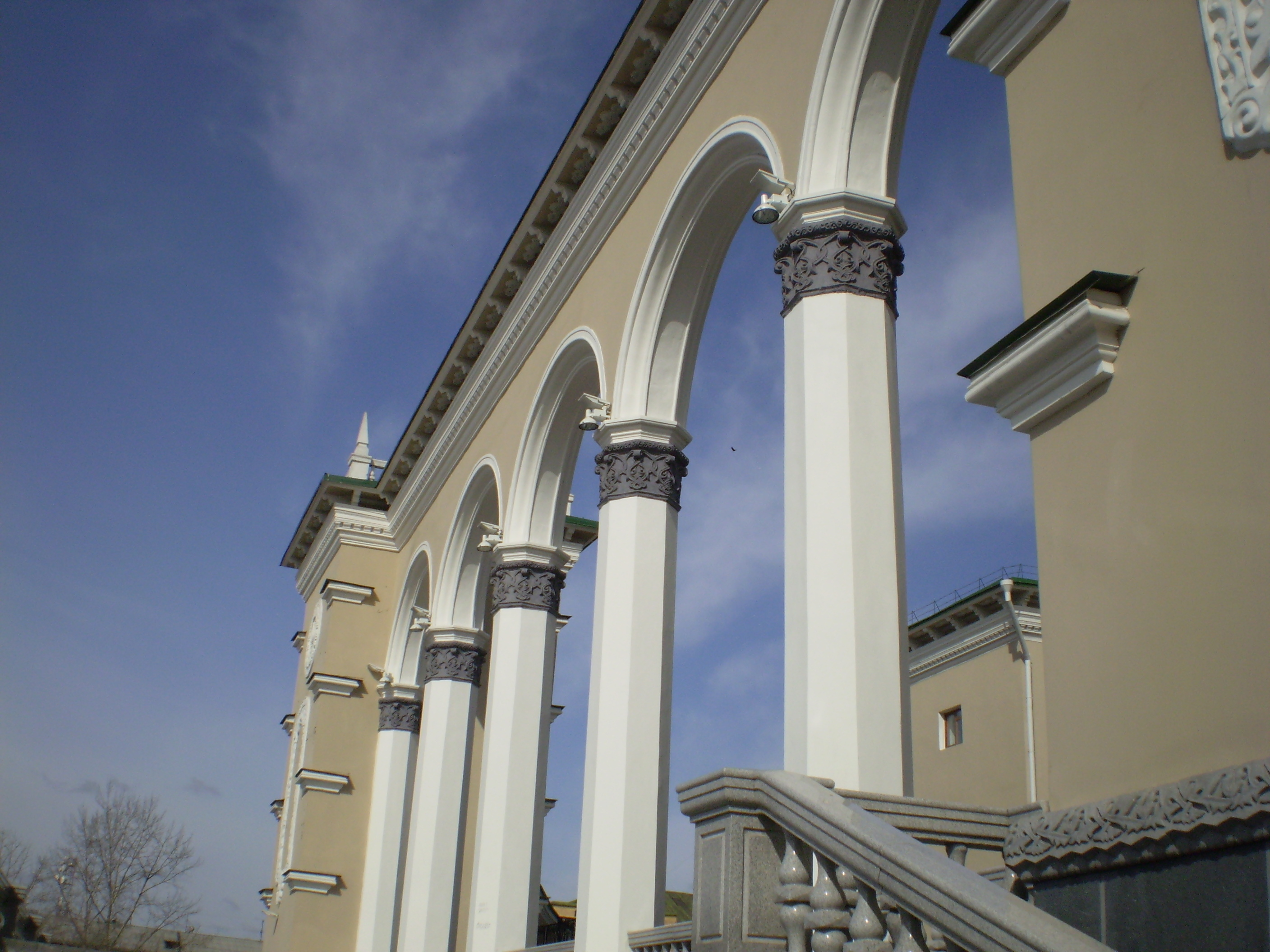 Бурятский академический театр оперы и балета. Южная часть.